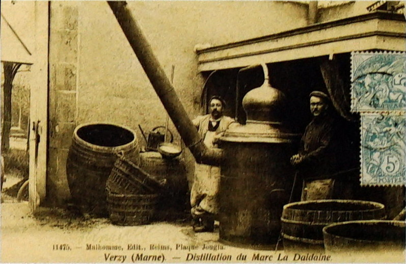 sur une carte du début XXe.